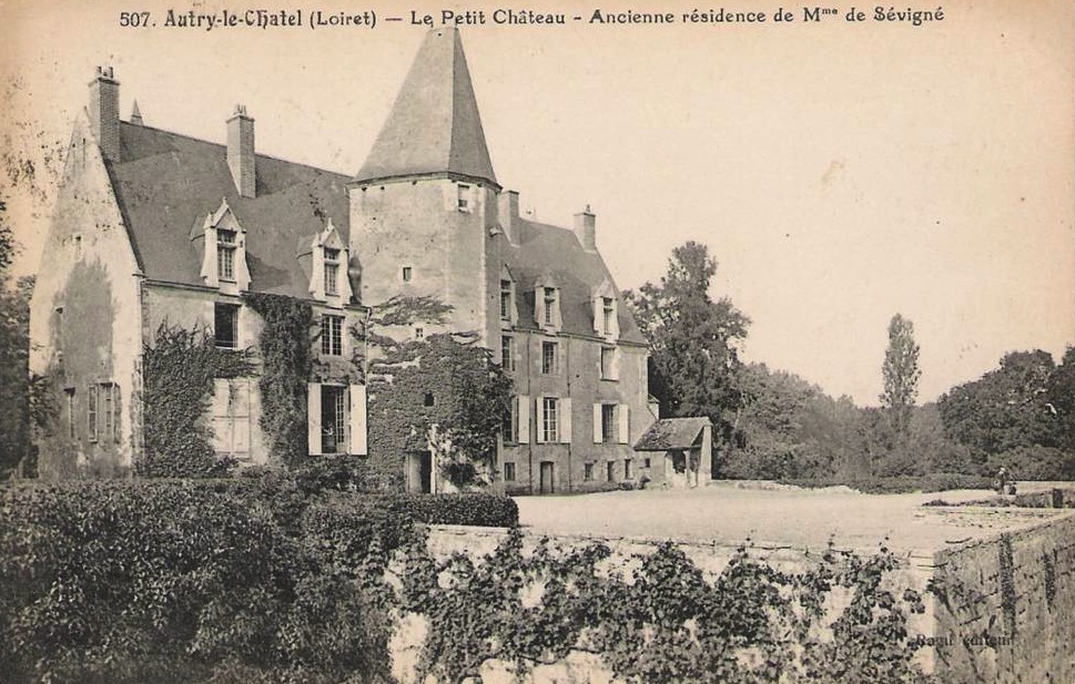 Petit château, Autry-le-Châtel, Loiret, Centre, France